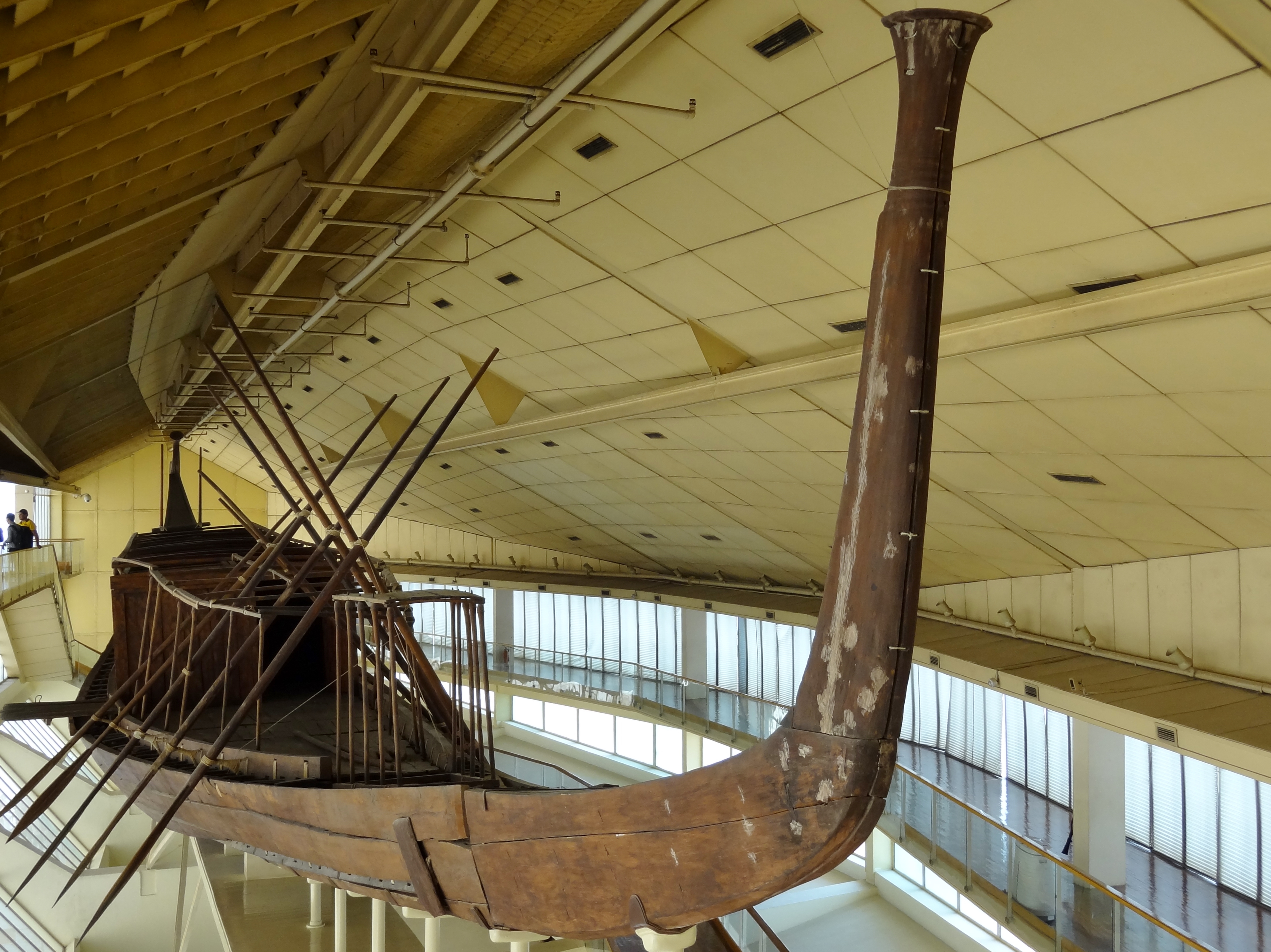 Sonnenbarke des Cheops im Museum neben der Cheops-Pyramide in Giseh, Ägypten